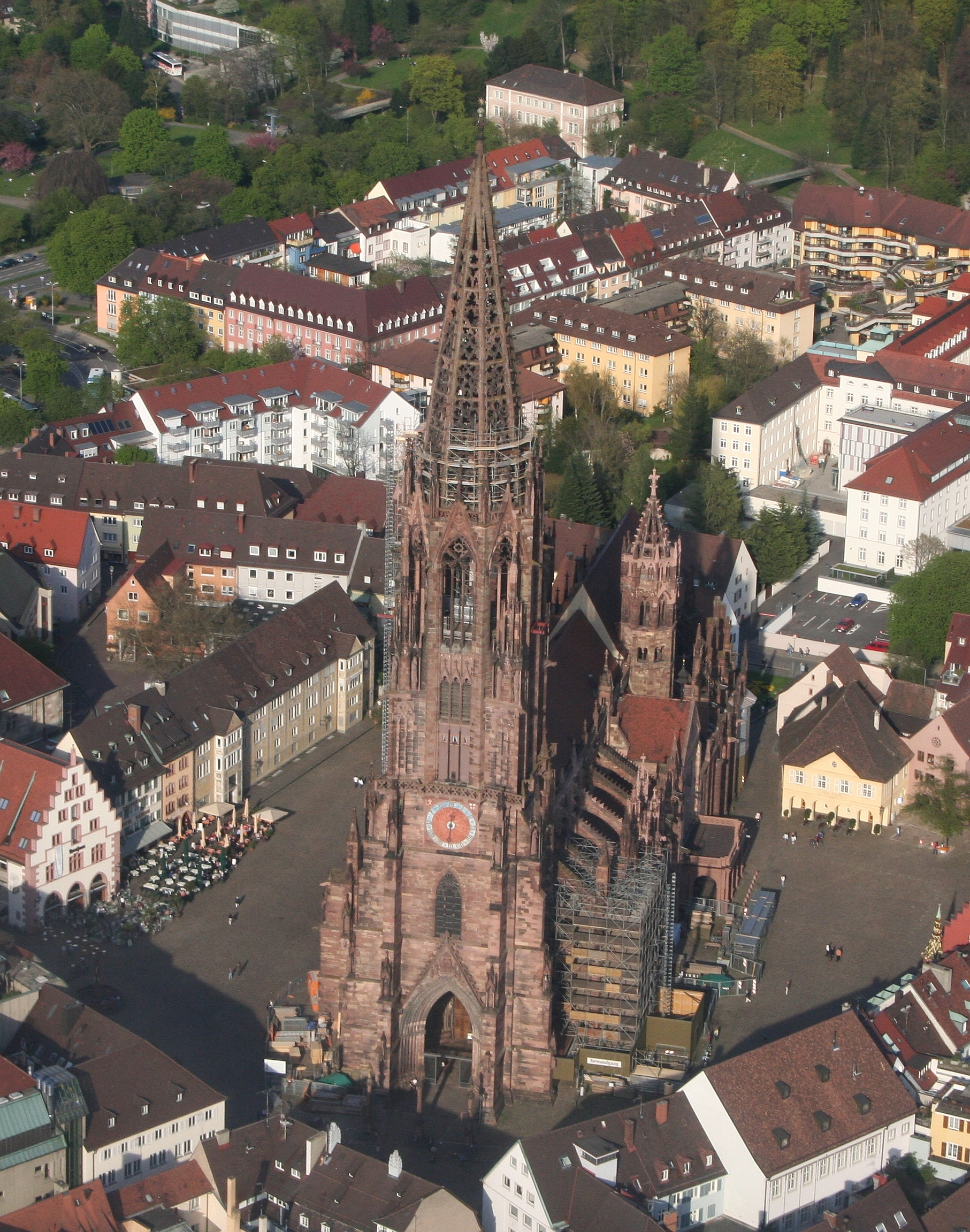 Luftaufnahme Freiburger Münster